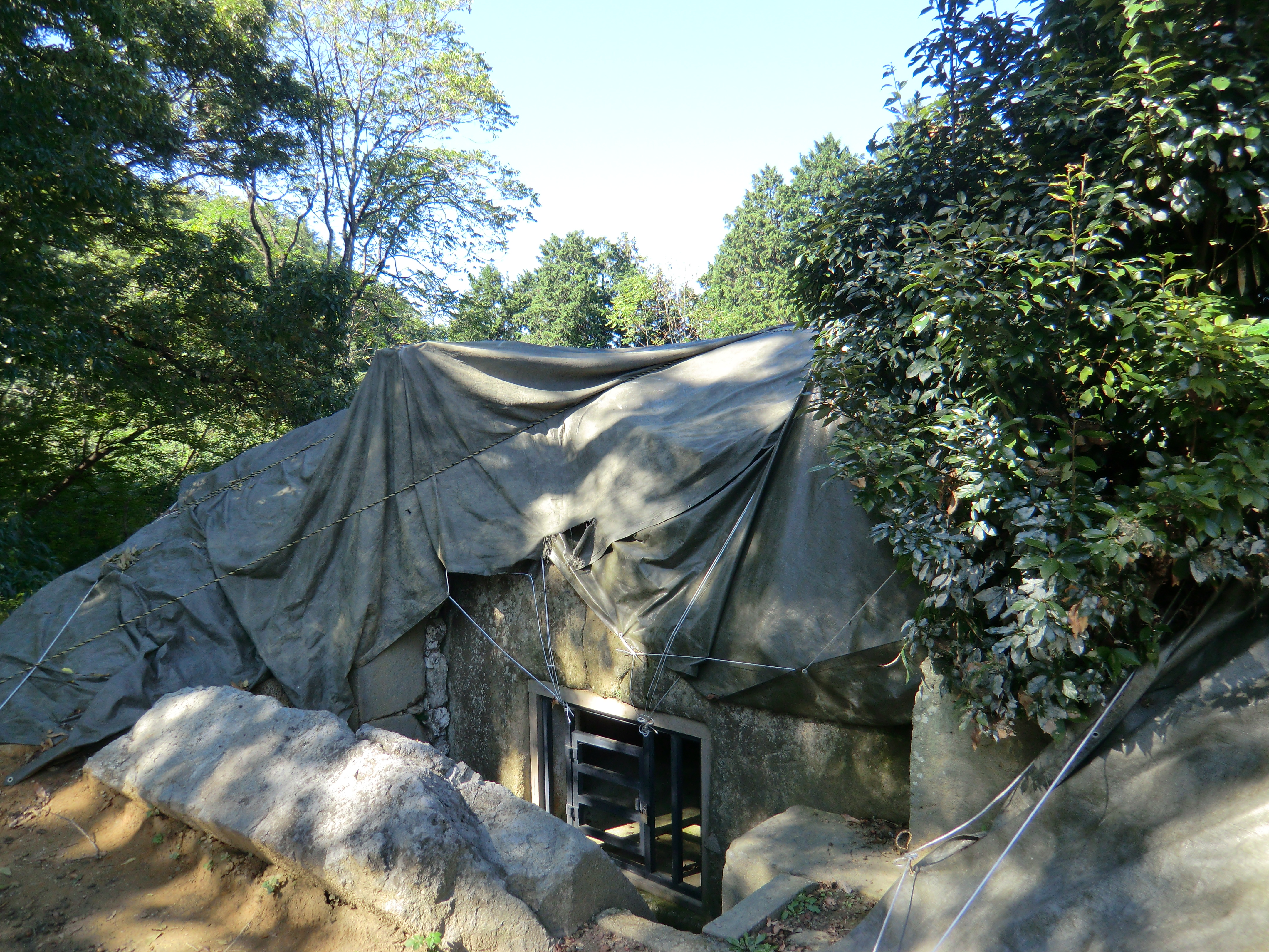 牽牛子塚古墳 (2014年10月撮影)